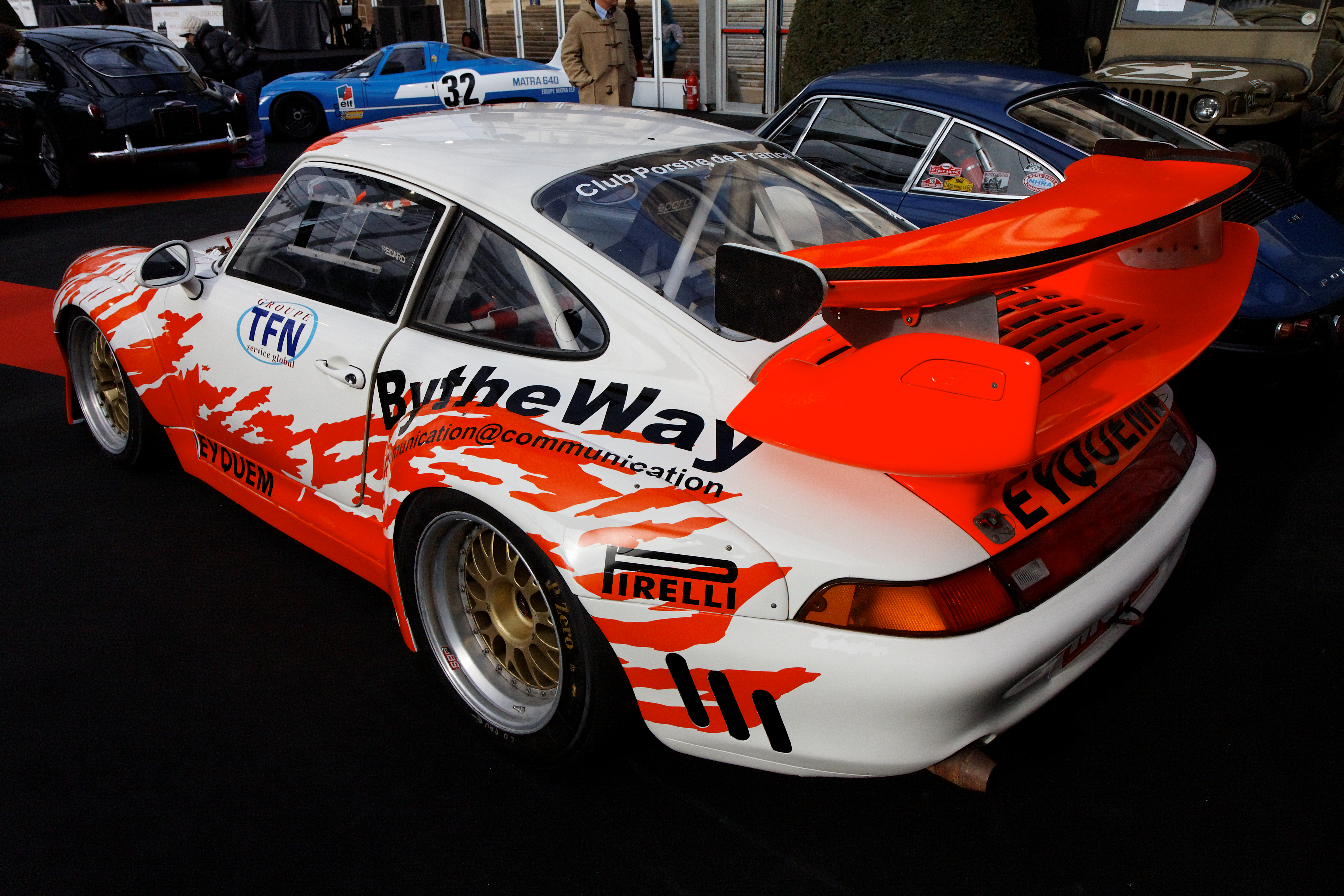 Porsche 996 GT2 'Rennwagen' Evo2 - Festival Automobile International 2011 - Vente aux enchères